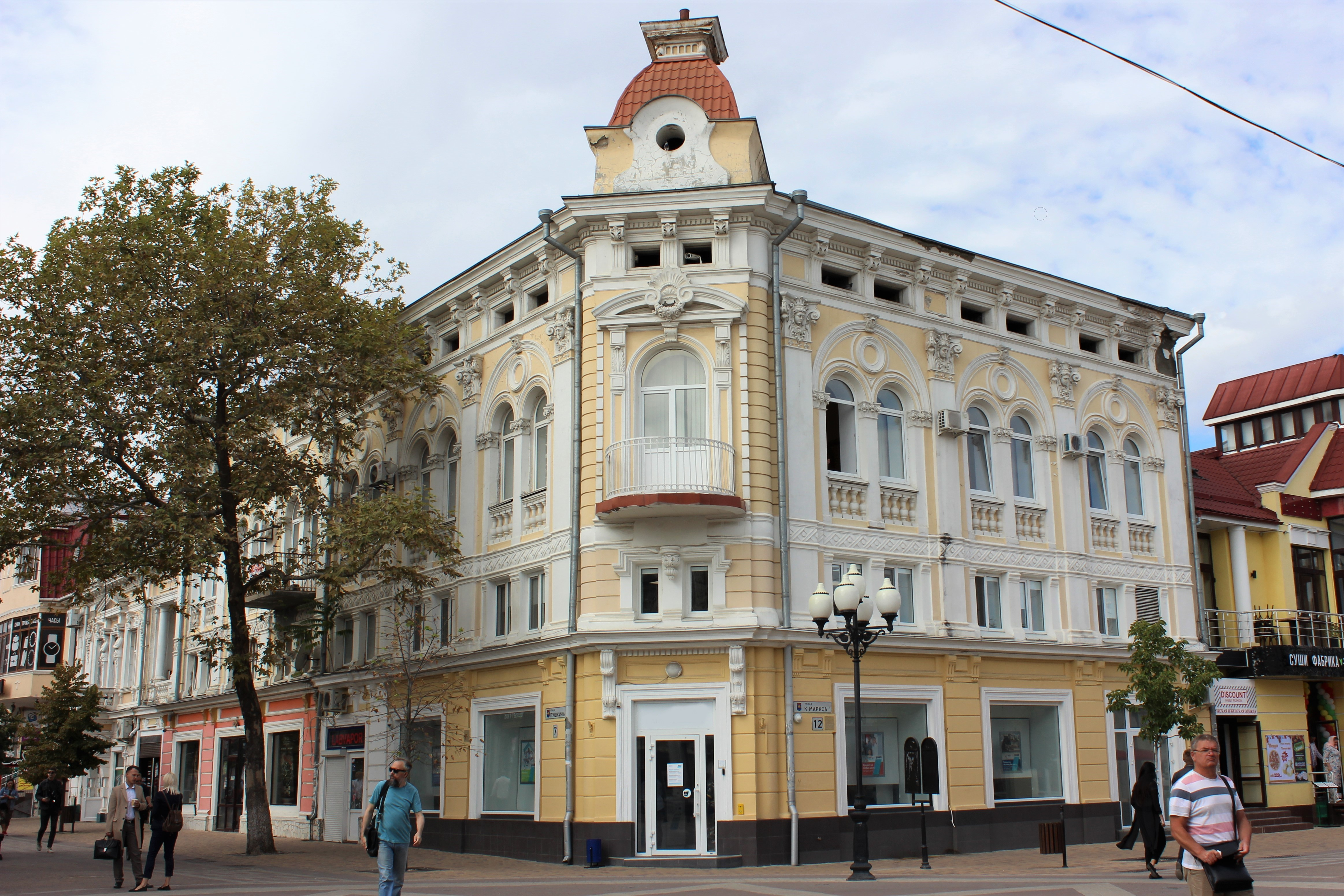 Будинок мануфактурного магазину М. Я. Семерджієва, Сімферополь, вул. Пушкіна, 7/12, літ. А (ріг. К. Маркса)